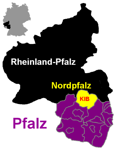 Die Nordpfalz als Teil der Pfalz